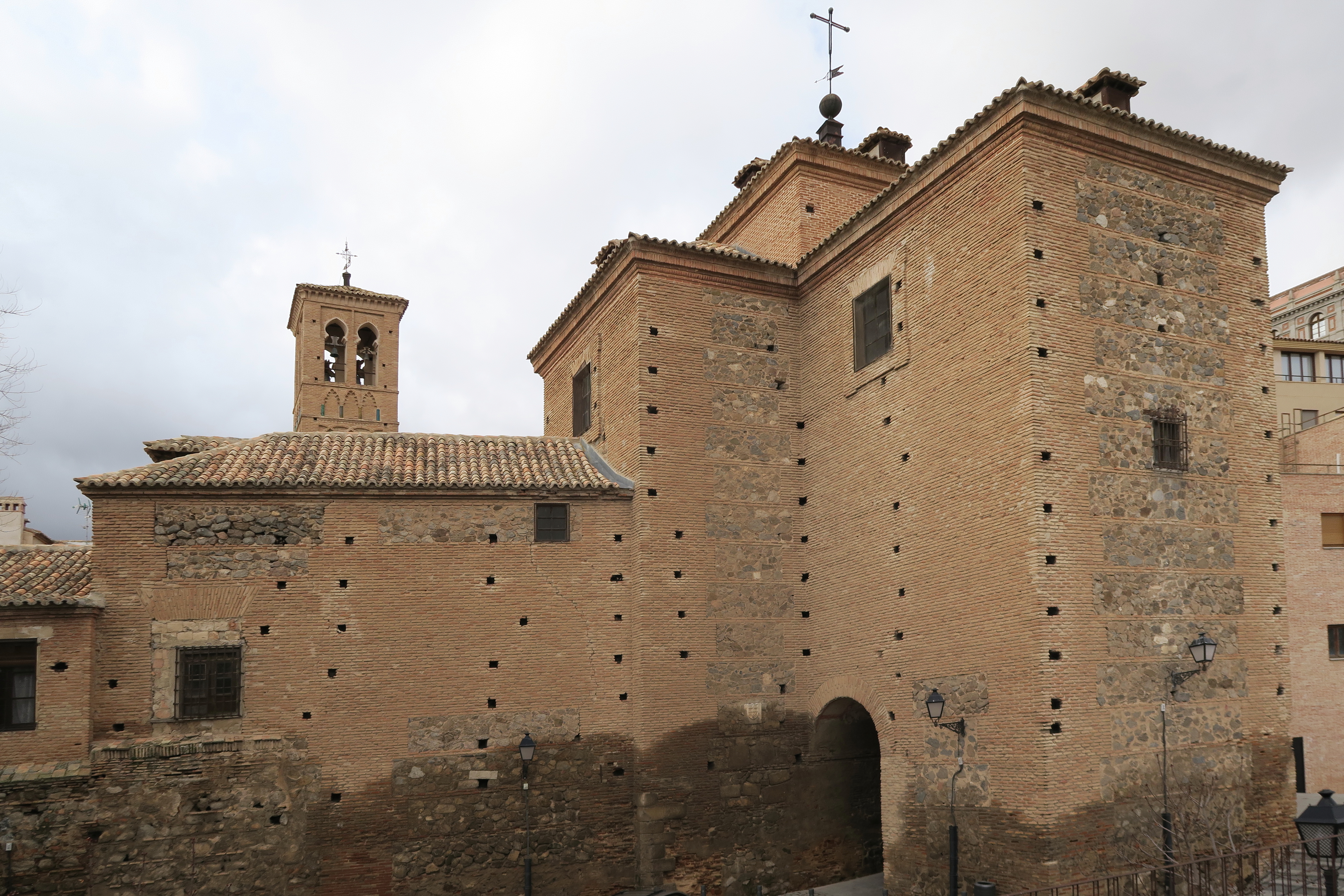 Iglesia de San Miguel el Alto, Toledo